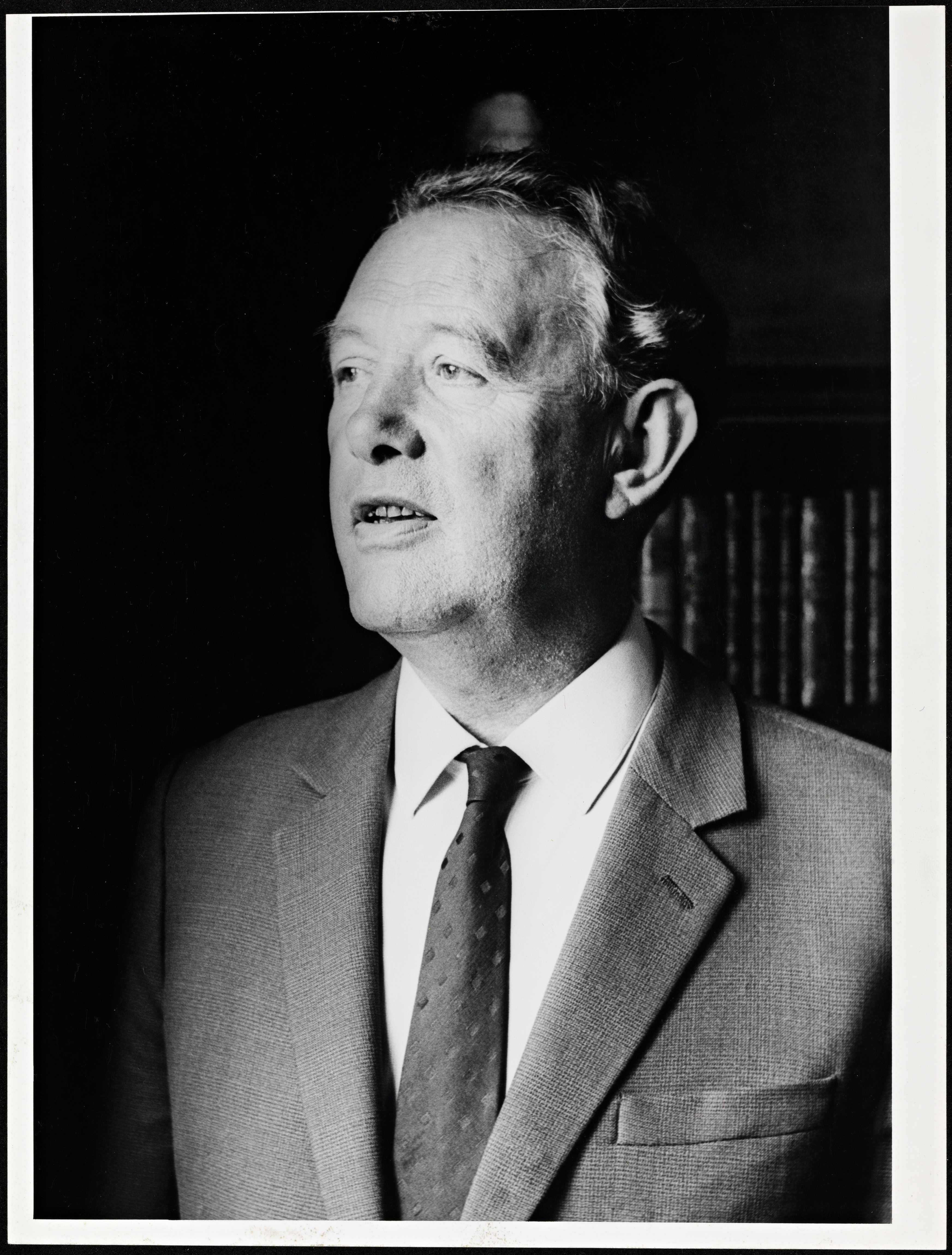 Beskrivelse / Description: Harald Tveterås var overbibliotekar ved Universitetsbiblioteket i Oslo 1953–69 og riksbibliotekar ved Riksbibliotektjenesten 1969–74 (kilde: snl.no). Dato / Date: ukjent / unknown Fotograf / Photographer: ukjent / unknown Digital kopi av original / Digital copy of original: s/h papirpositiv Eier / Owner Institution: Nasjonalbiblioteket / National Library of Norway Lenke / Link: Bildesignatur / Image Number: blds_06057